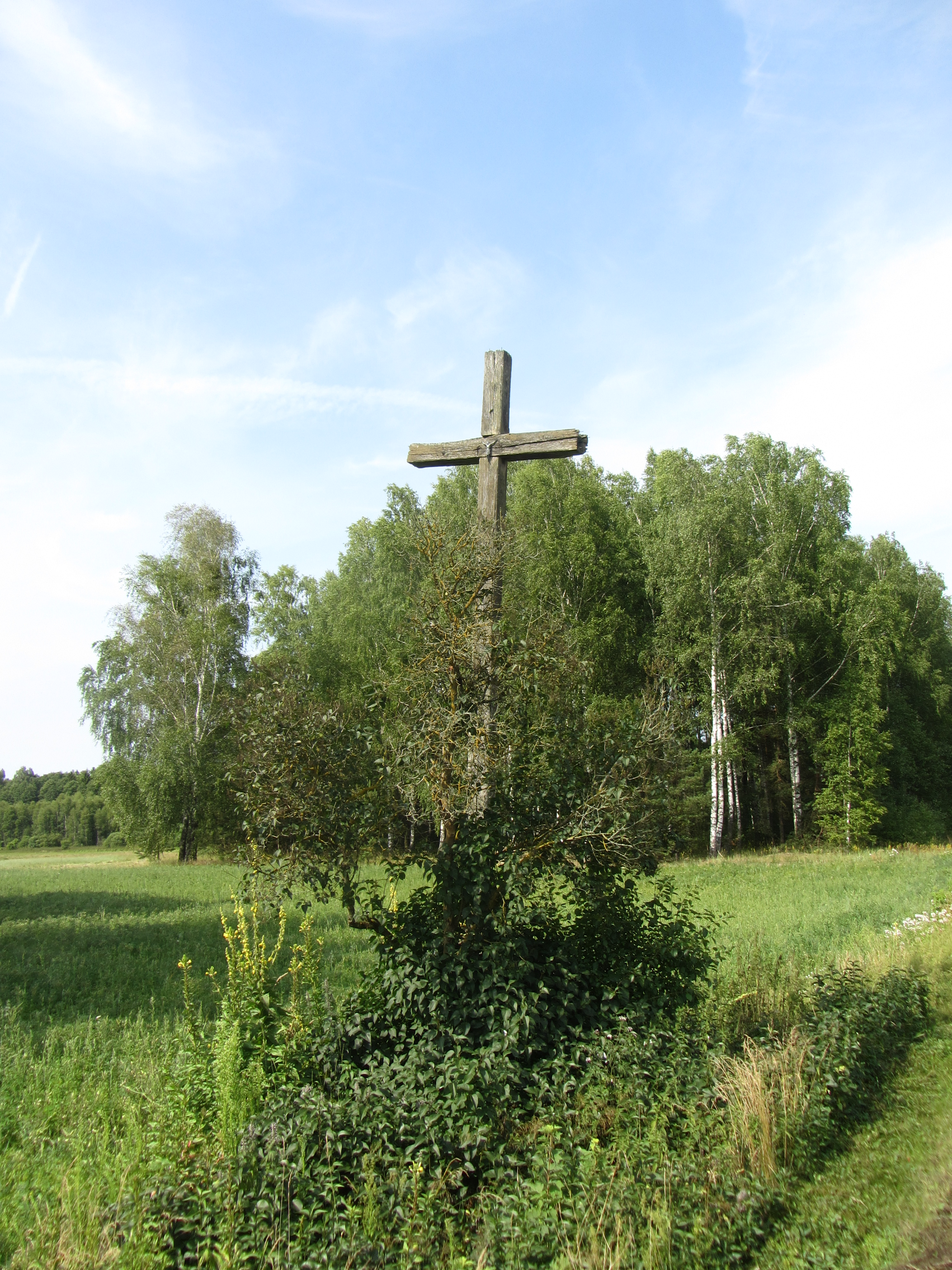 Leipalingio sen., Lithuania